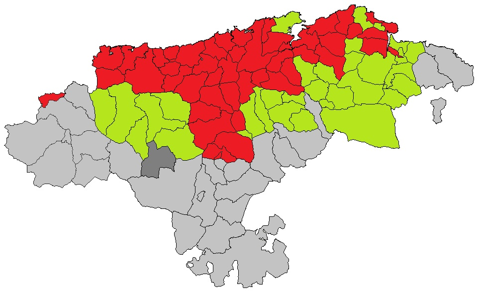 Carro de tierra. En Rojo, con superficie equivalente a 179 m2, En verde el carro, con otras medidas diferentes dependiendo del municipio.